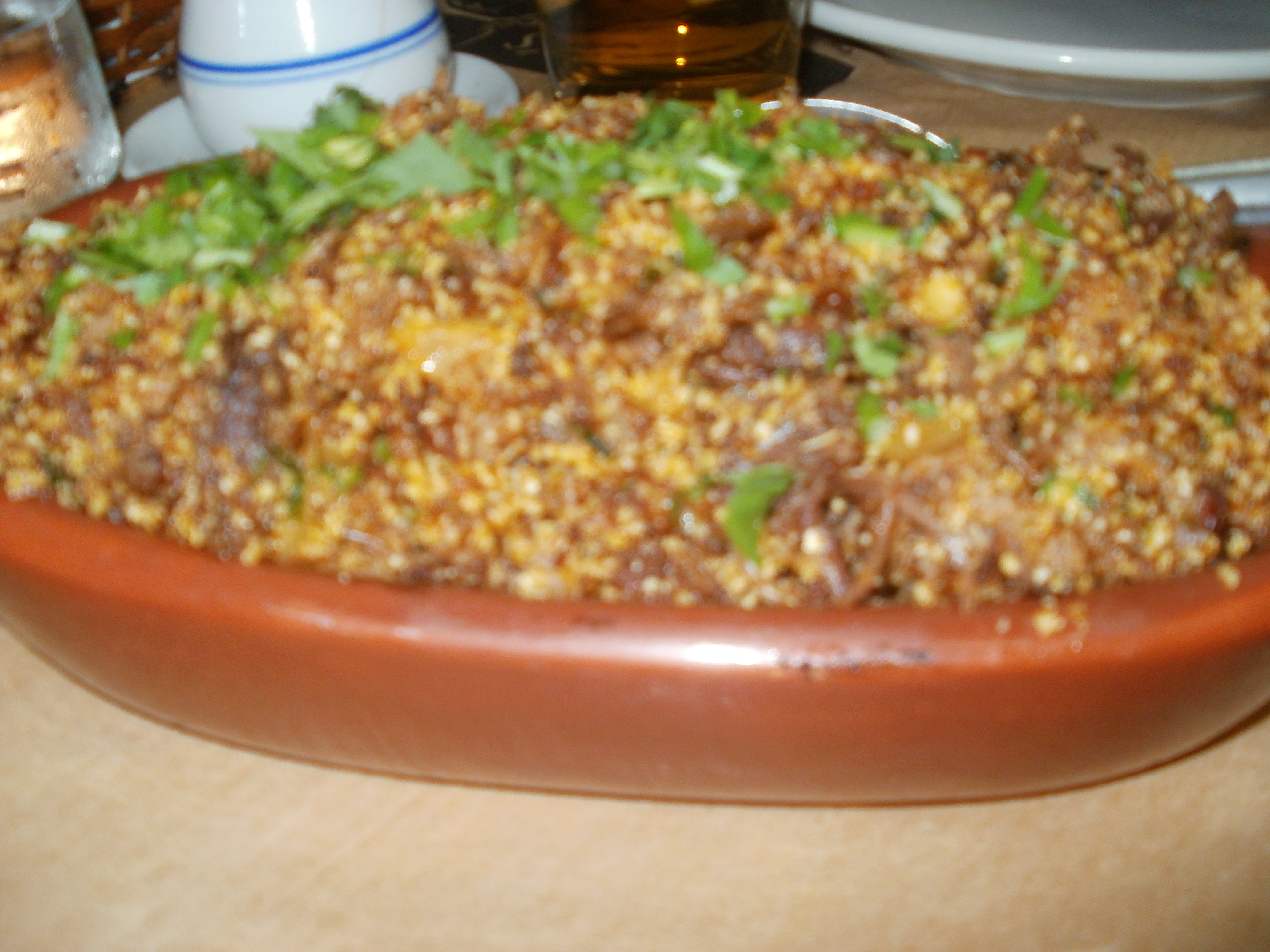 Paçoca nordestina, no Restaurante Chapéu de Couro, Bonsucesso, Rio de Janeiro, Brasil.